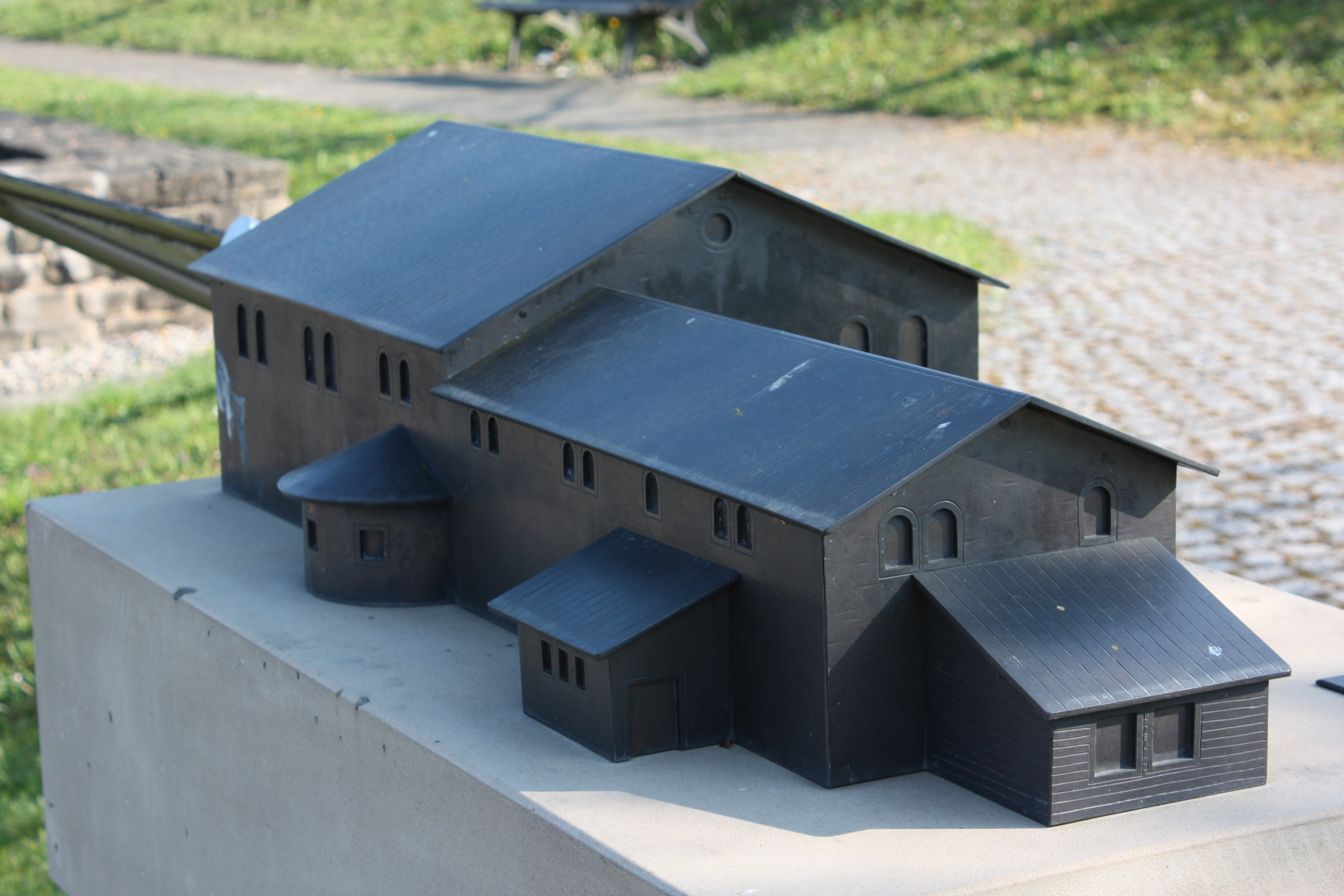 Modell des Römerbades Schirenhof (Schwäbisch Gmünd)